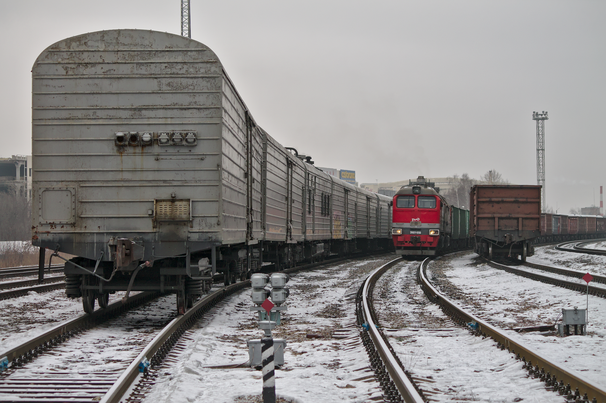 Спрятался. 2М62У-0200 и грузовые составы, Ростокино, Москва. см. фото 565947 в альбоме автора